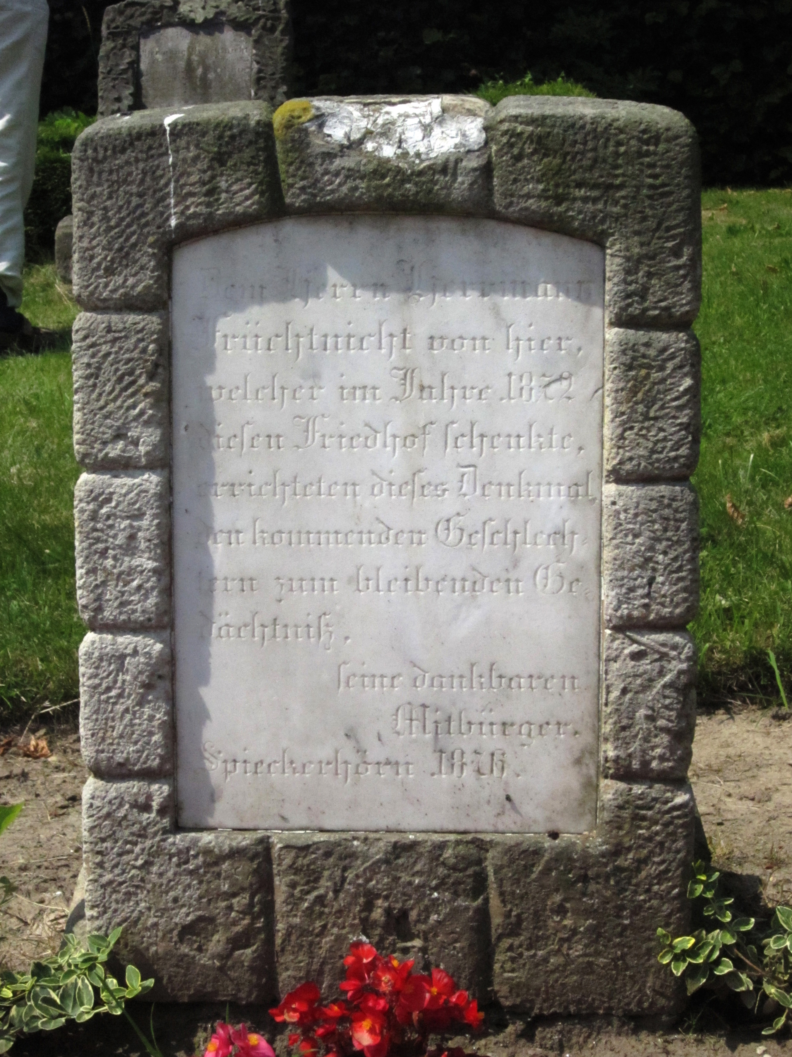 Raa-Besenbek,Friedhof Spiekerhörn, Gedenkstein, Foto: 2013